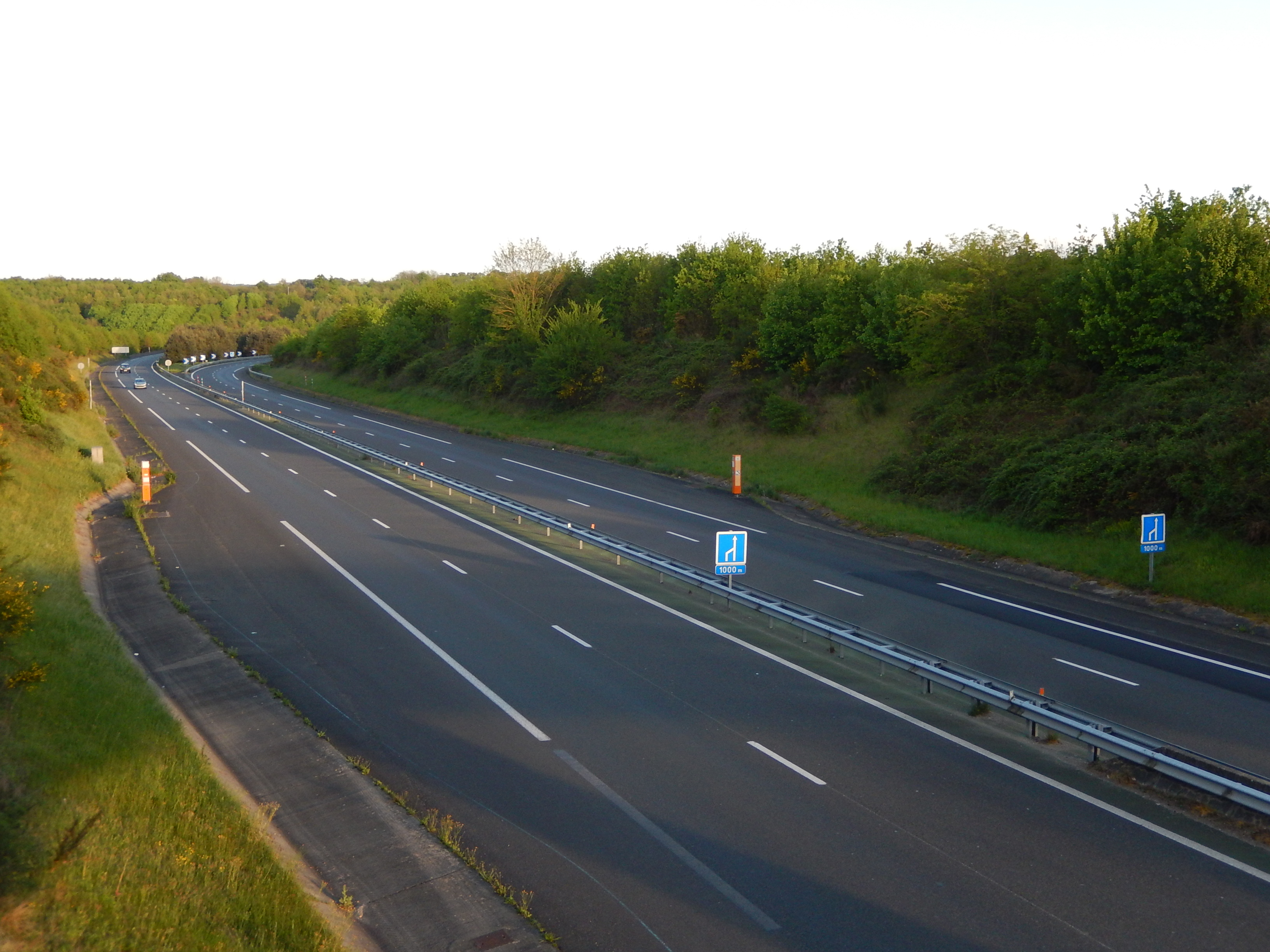 L'autoroute A837 au niveau de la commune d'Écurat (Charente-Maritime, France), vue depuis le pont de la route départementale D127, non loin de la jonction avec l'autoroute A10.